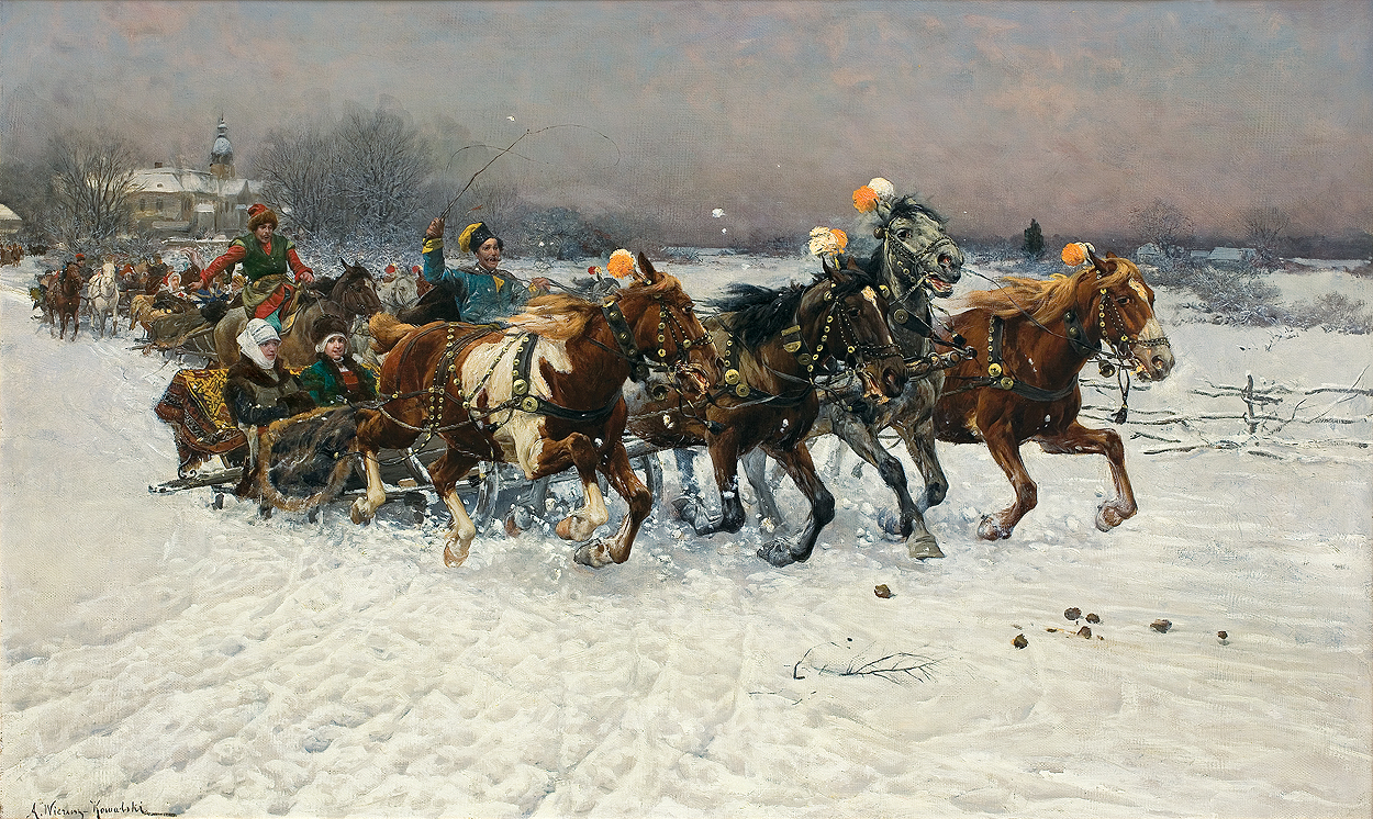 Литовский санный поезд. 1884.